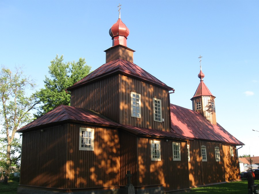 Ploski, cerkiew